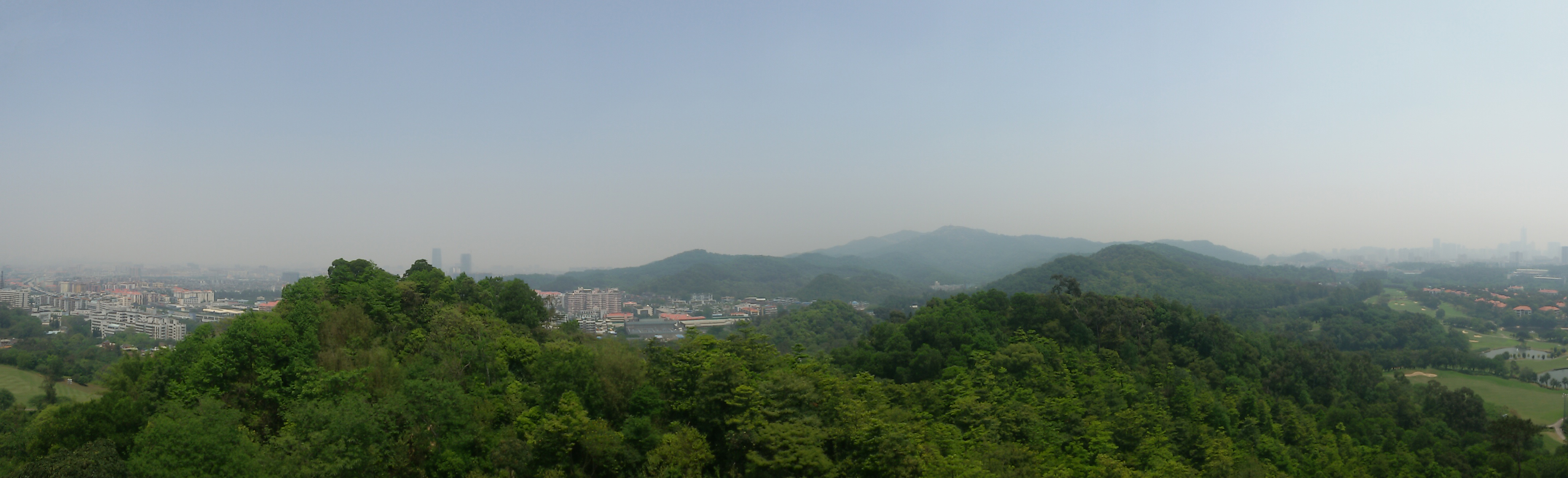 粵語: 北邊嘅廣州全景（喺鴻鵠樓嗰度影）